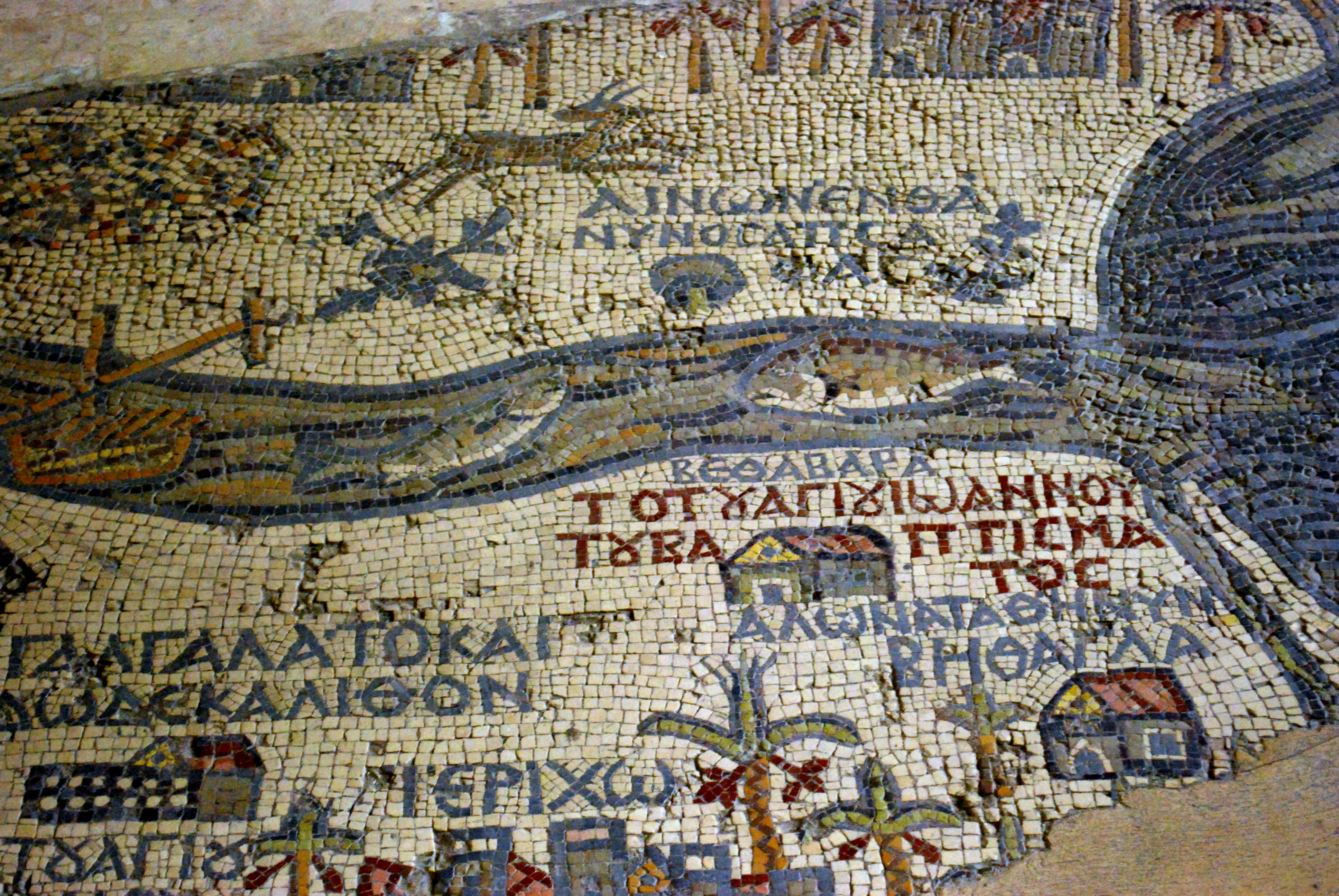 La carte de la Palestine, mosaïque du VIe siècle dans l'église Saint-Georges à Madaba (Jordanie) : détail de la zone de l'embouchure du Jourdain dans la Mer Morte et du site du baptême par saint Jean.